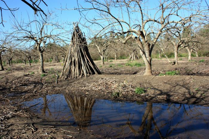 מטע אפרסמונים בשלכת